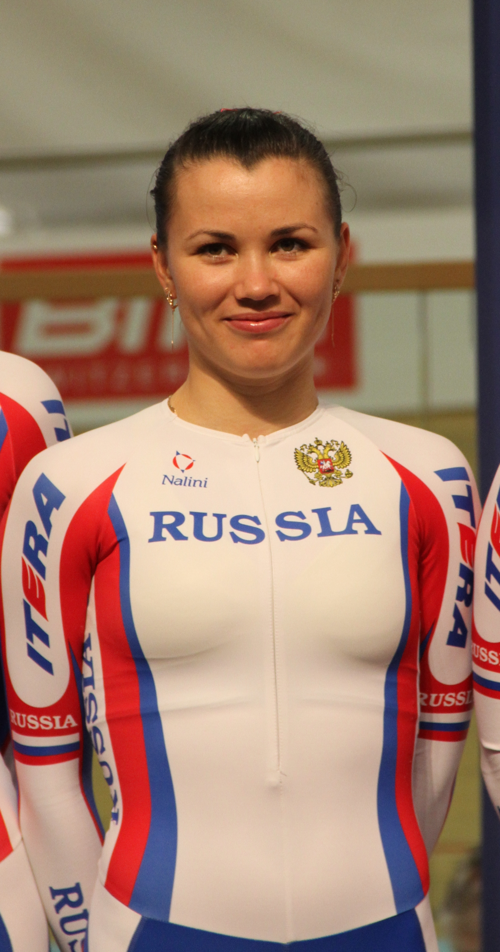 Gulnaz Badykova, russische Radsportlerin The making of this document was supported by the Community-Budget of Wikimedia Germany.